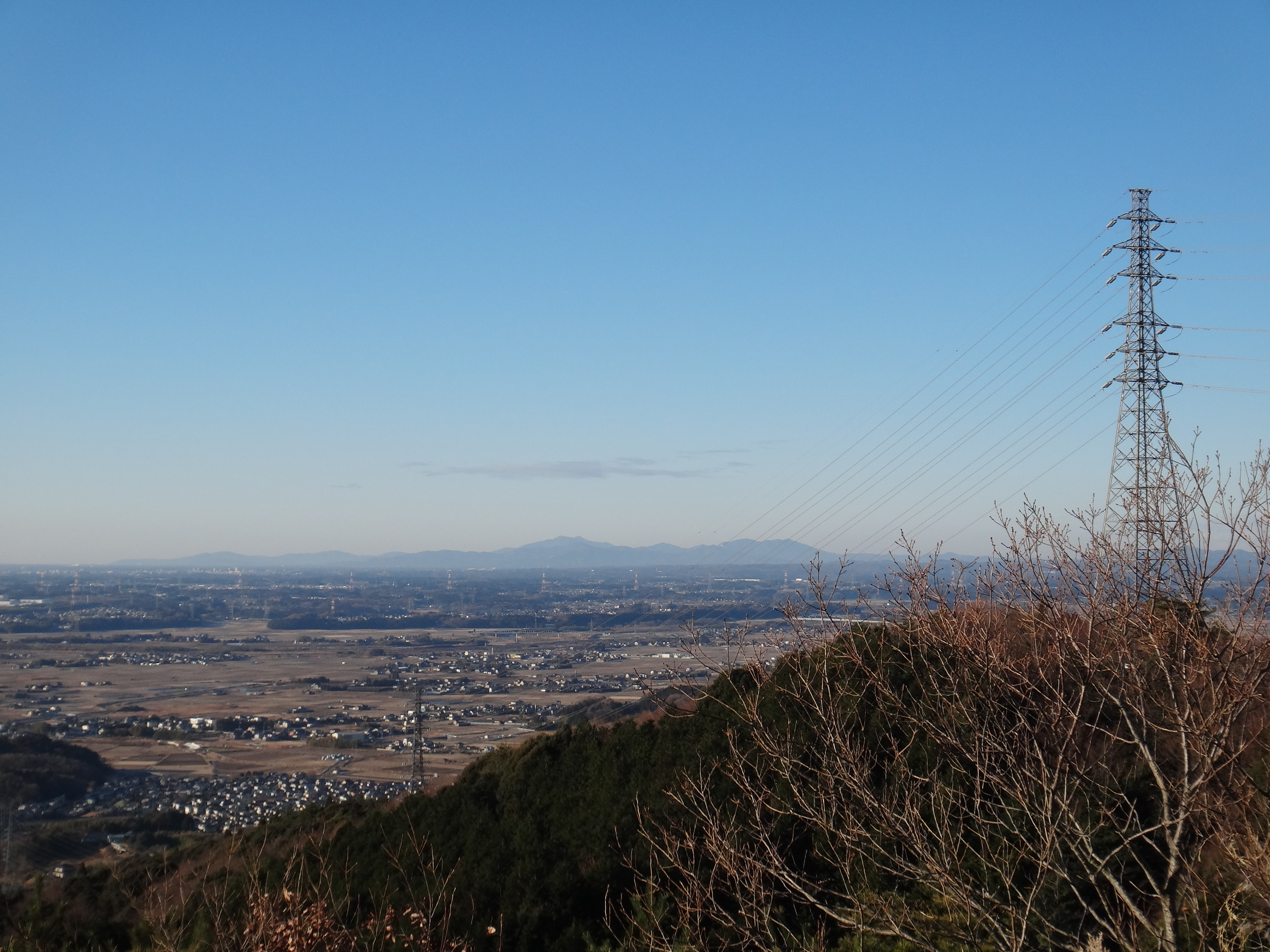 見晴らし台からの筑波連峰